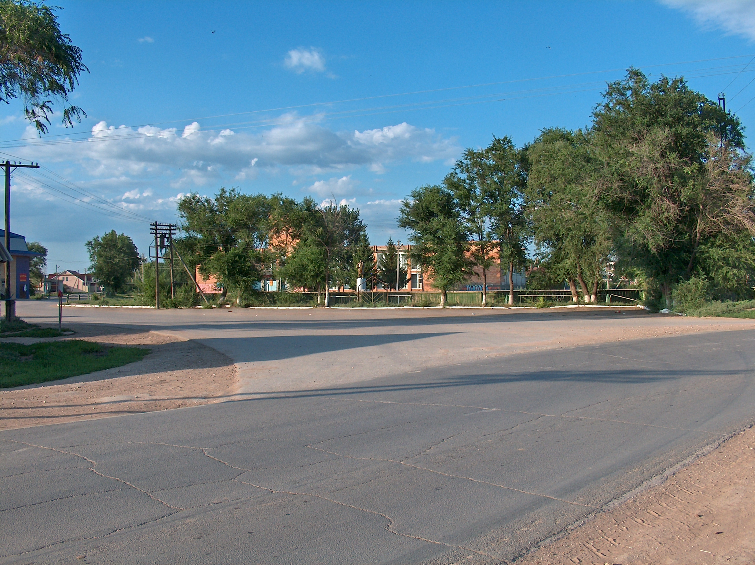 Село Утёвка. Вид Дома культуры и сквера передним со стороны Торговой улицы